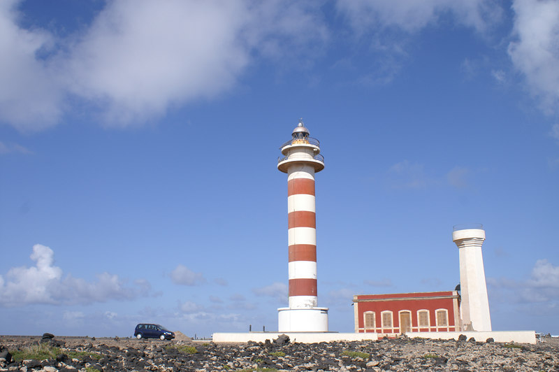 Vuurtoren El Cotillo Fuerteventura Spanje